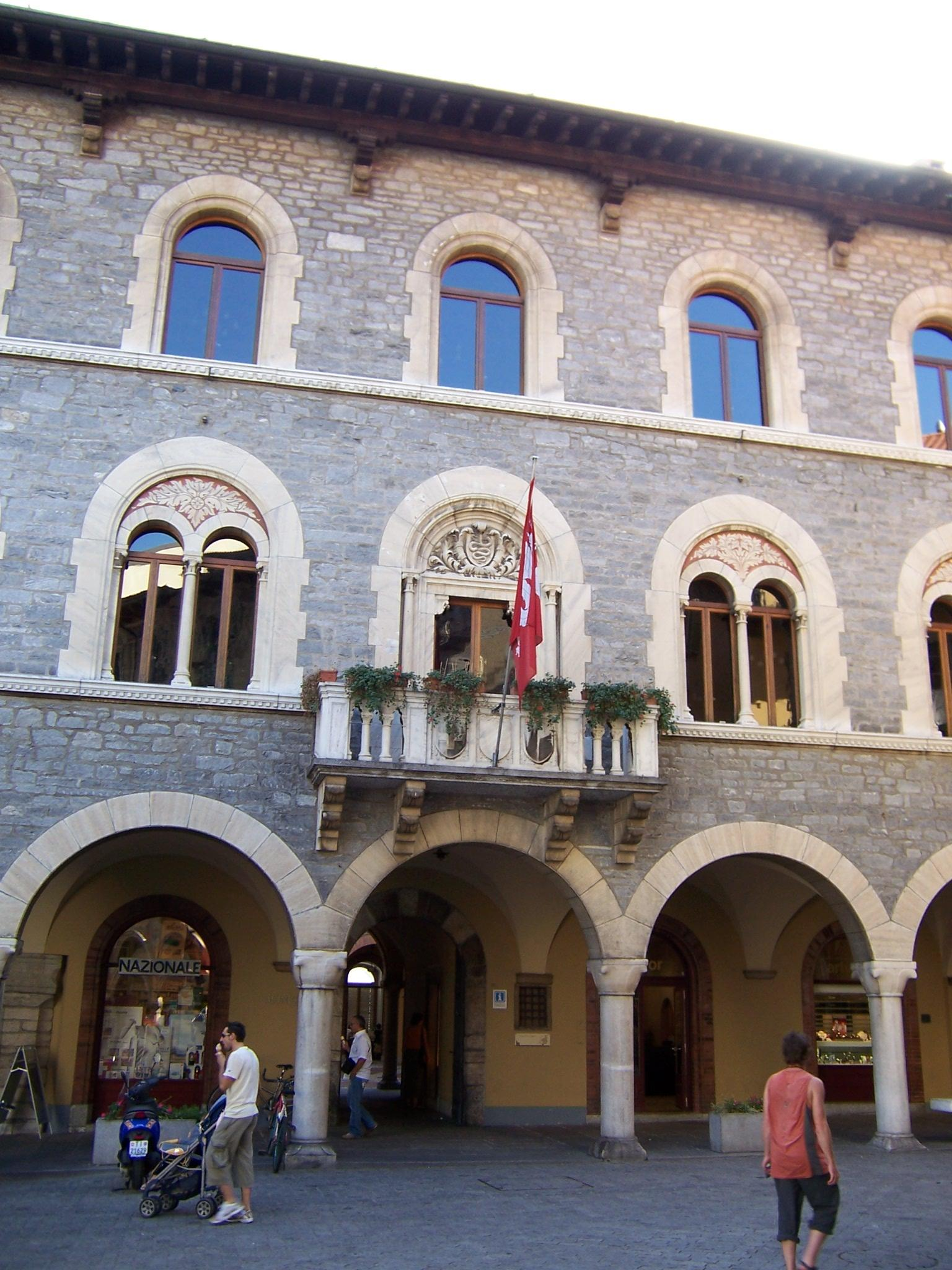 Rathaus von Bellinzona (Kanton Tessin / Ticino, Schweiz) eigene Aufnahme vom 5. September 2006